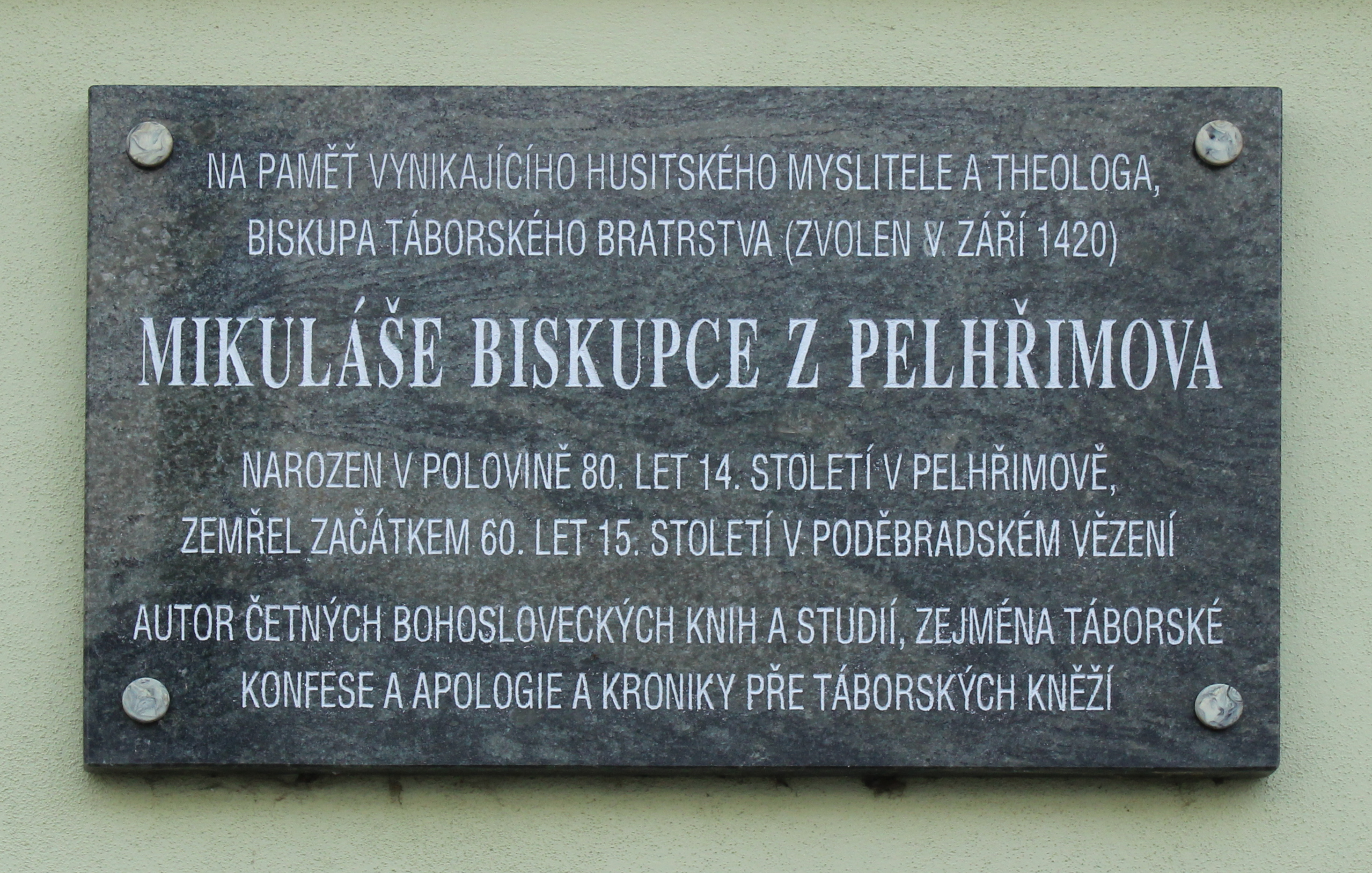 Pamětní deska Mikuláše Biskupce na modlitebně Českobratrské církve evangelické v Pelhřimově, Růžové ulice číslo 82. Project: Fotíme Česko.